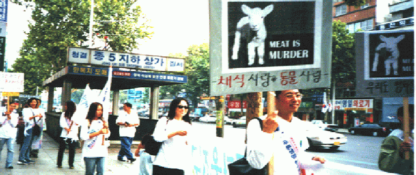 2000년.대학로에서 명동까지 채식홍보 가두캠페인